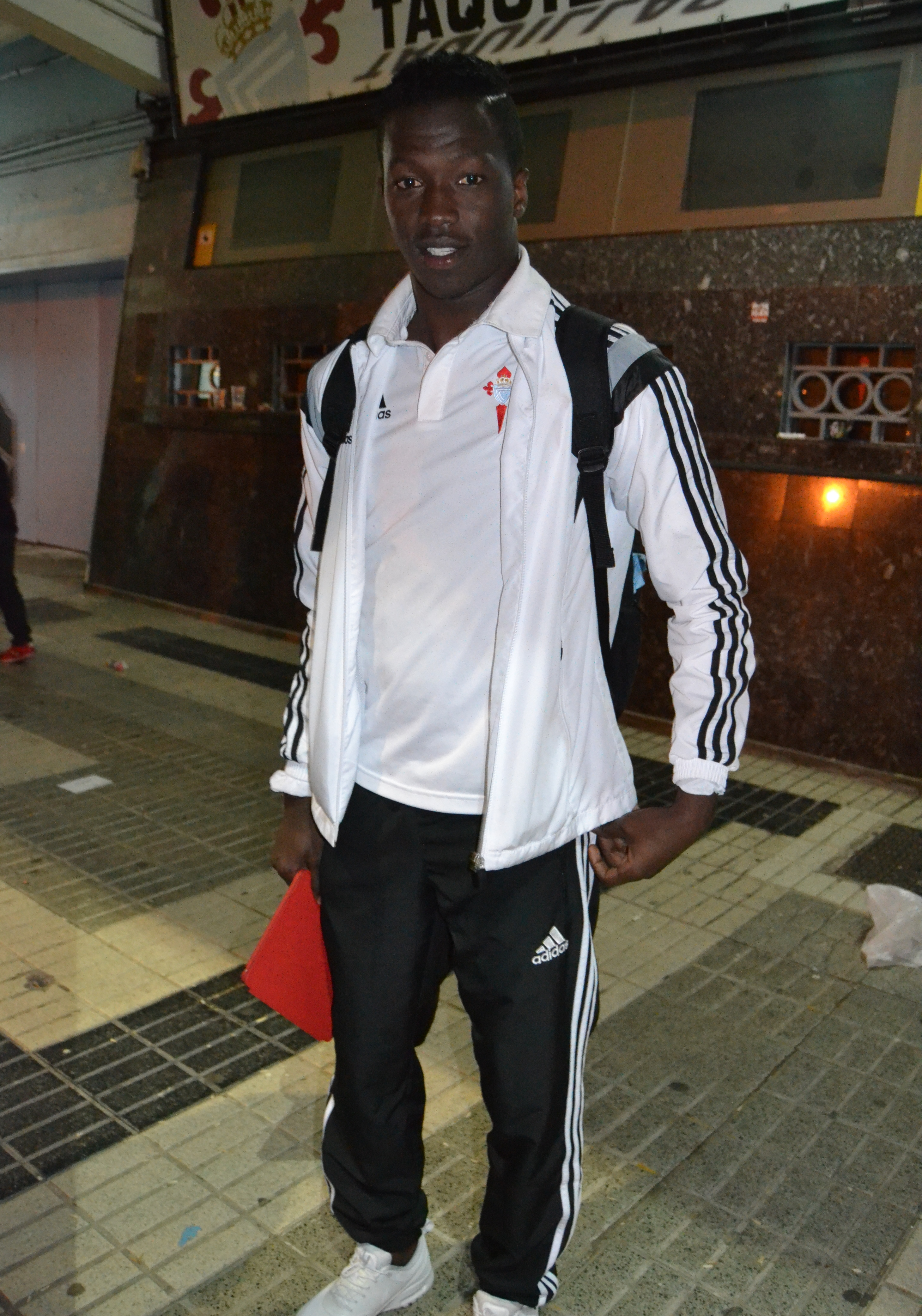 O xogador Pape Cheikh Diop Gueye